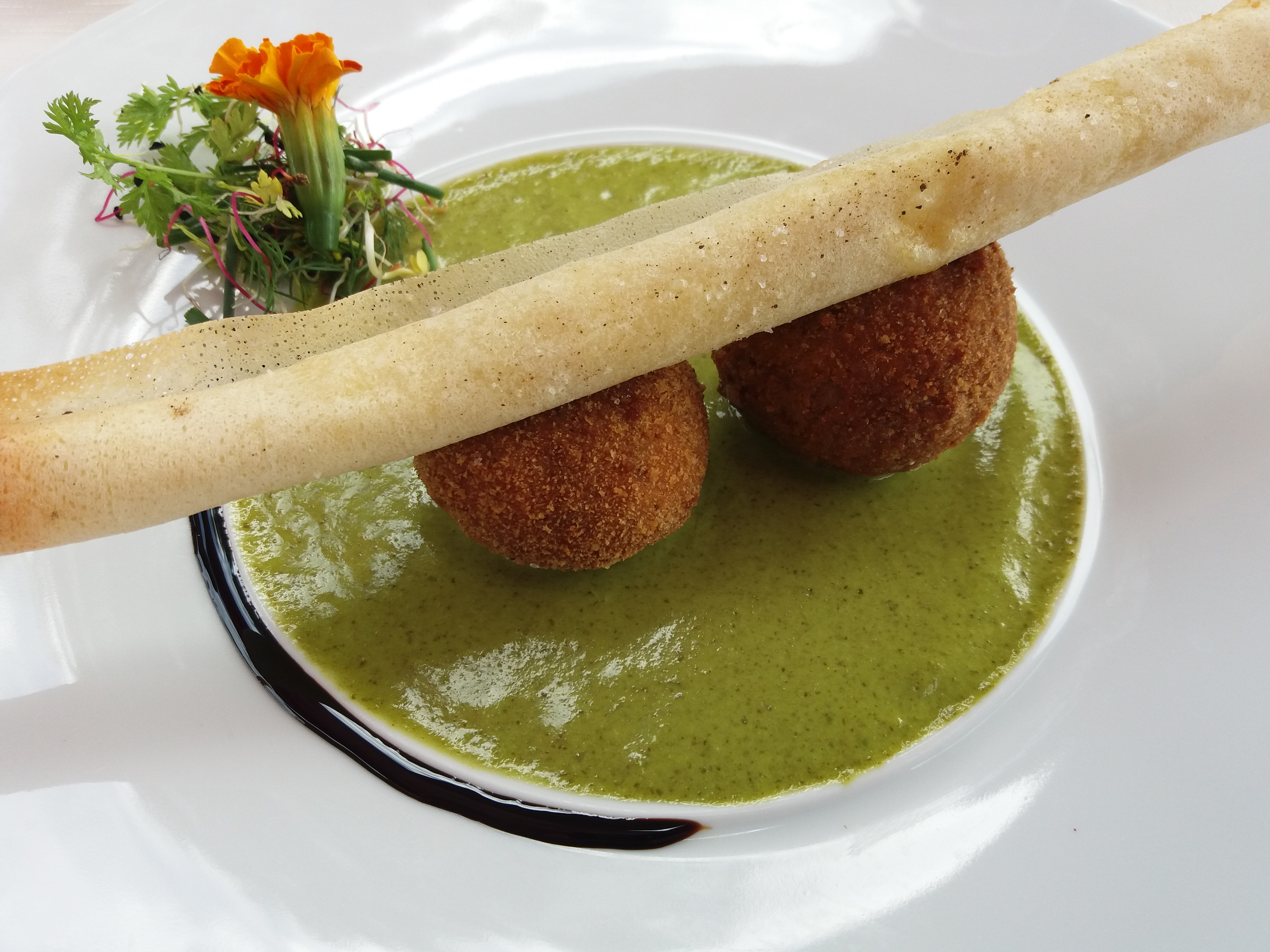 Cromesquis de foie gras de canard, croustillant au Rocamadour et sauce roquette. Restaurant Mas de Fauchon (Saint-Cannat, France)